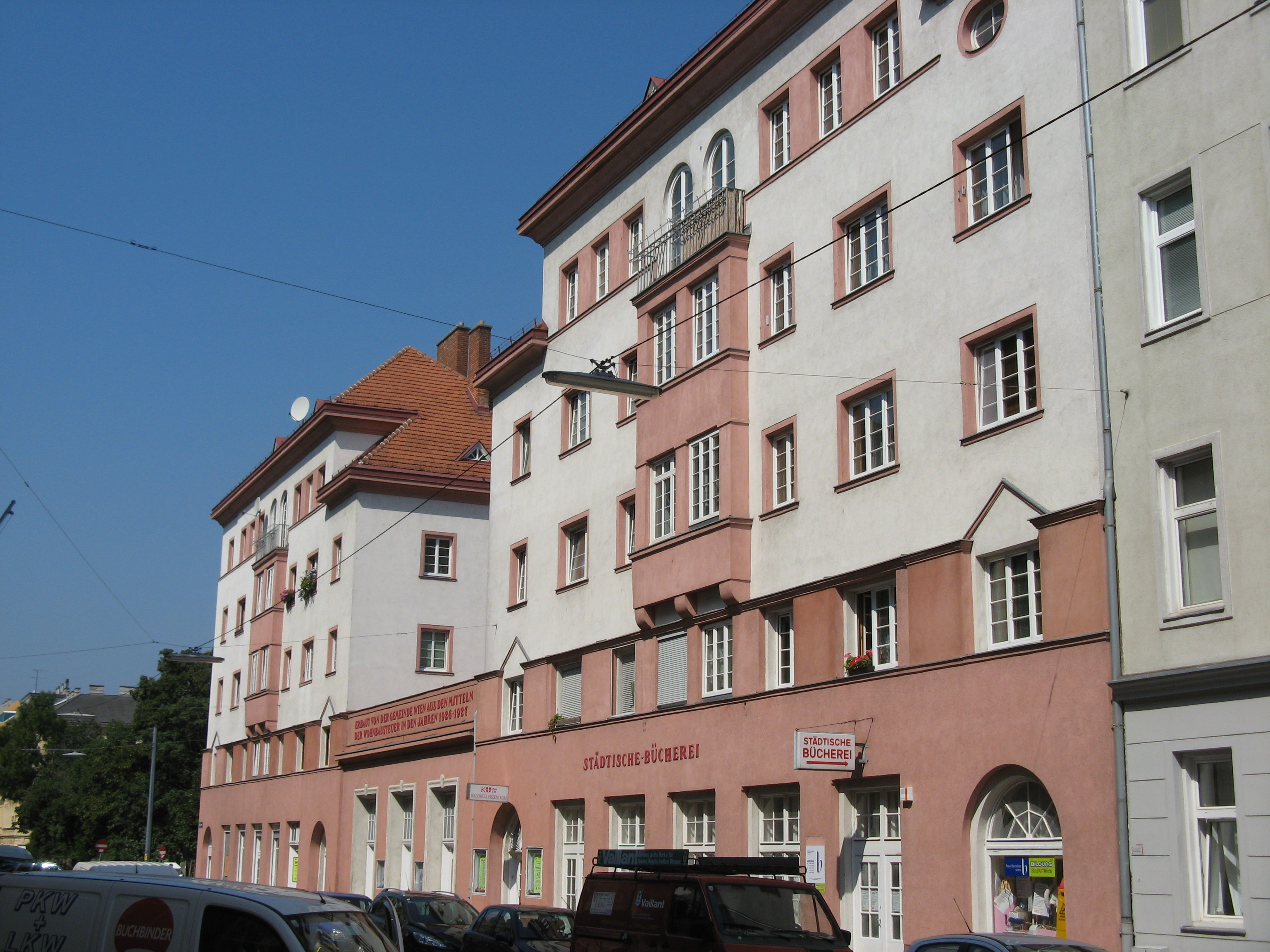 Pölzerhof von der Hasengasse aus (1926/27) von Hugo Mayer, Dampfgasse 35-37, Wien-Favoriten